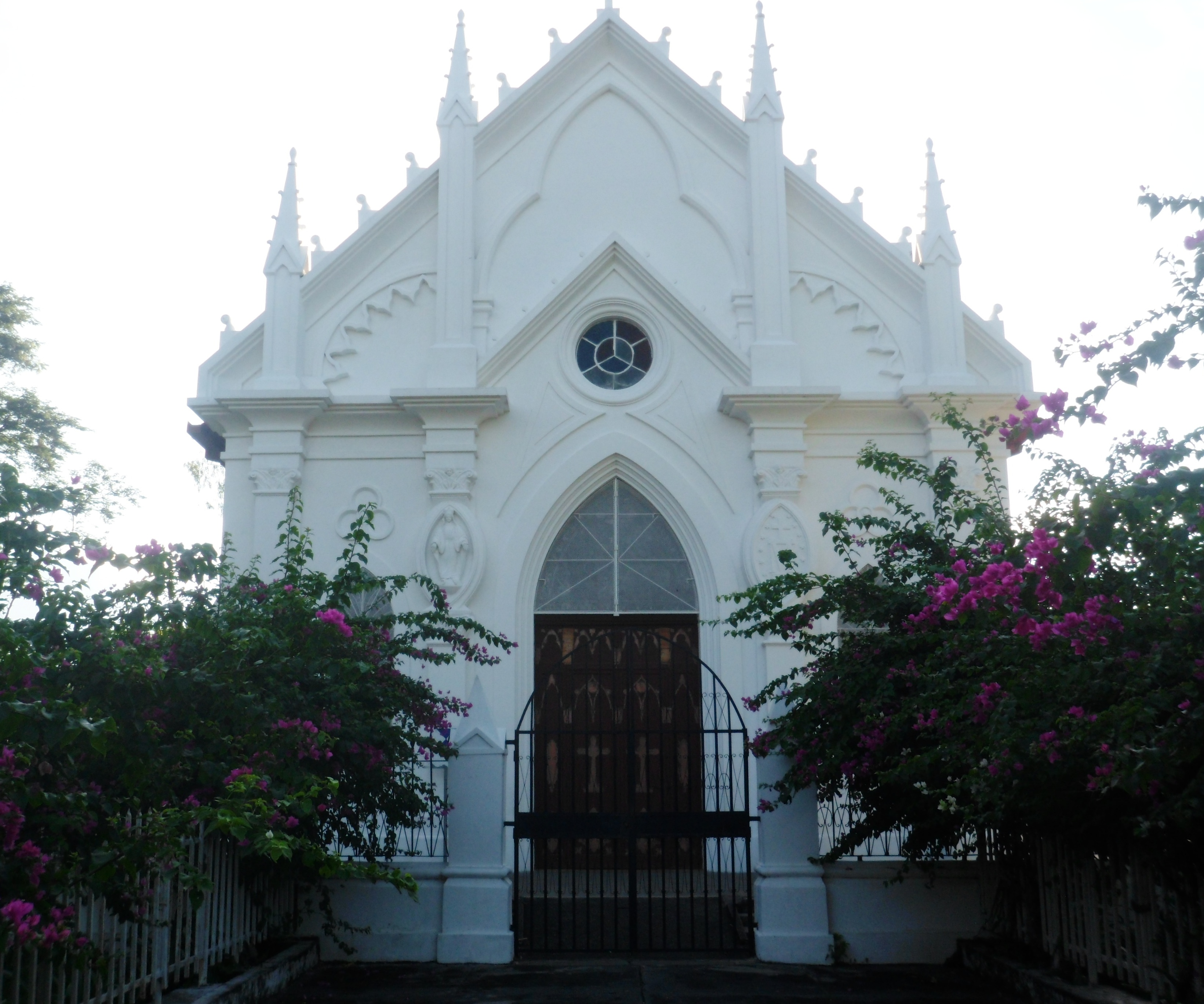 Ubicada en la ciudad de San Miguel, El Salvador